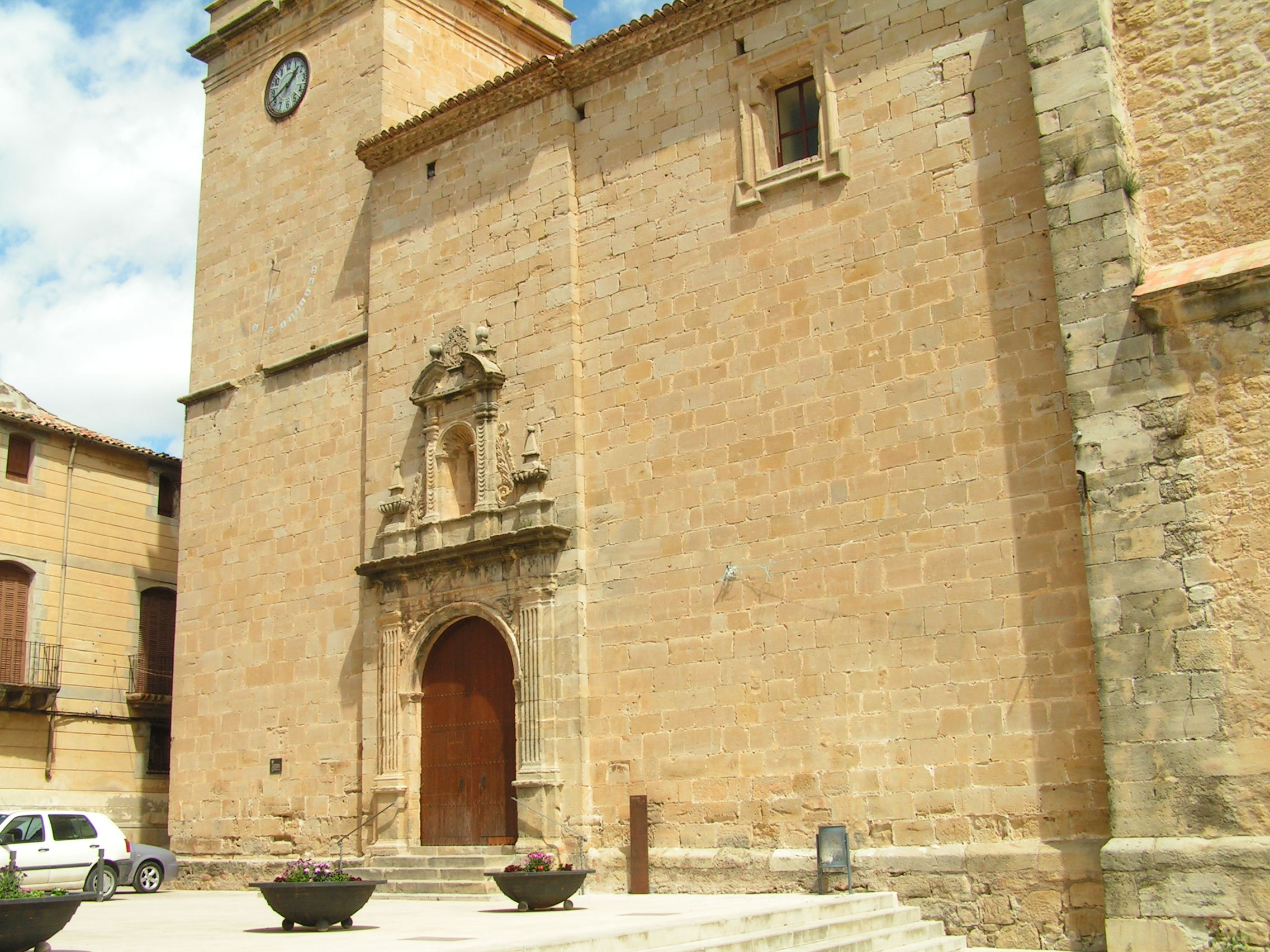 Façana de l'església d'Arnes